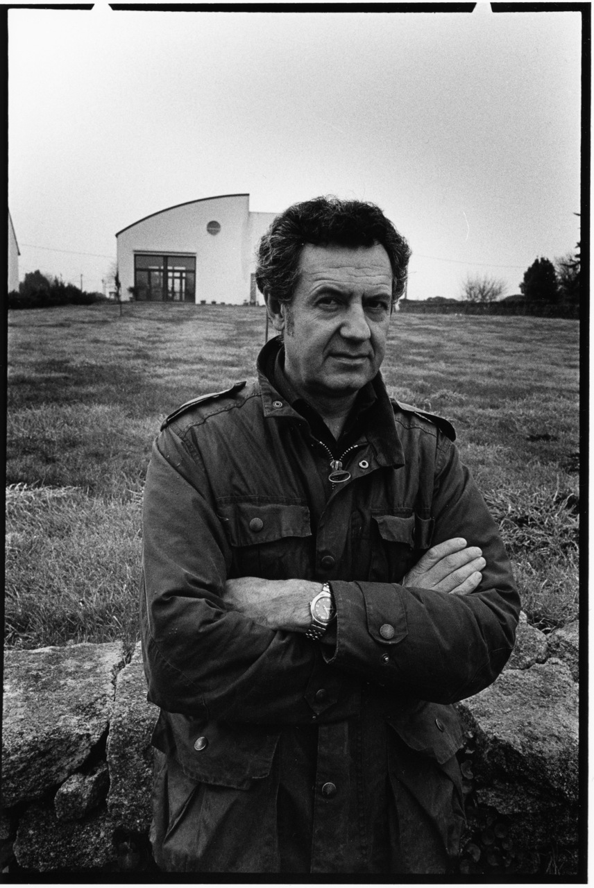 Jacques Godin, devant son atelier de Lesconil